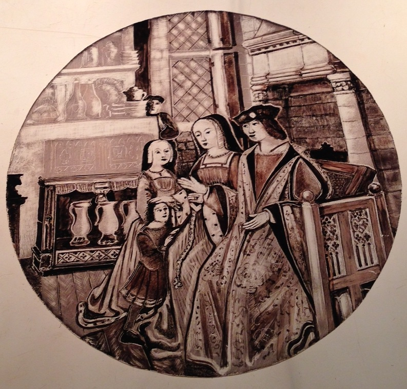 LouisXII et anne de Bretagne